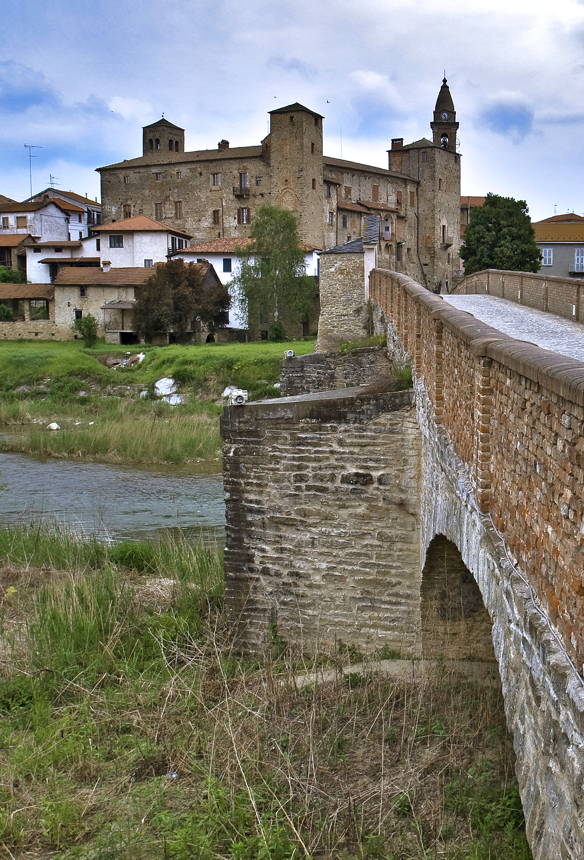 Castello This is a photo of a monument which is part of cultural heritage of Italy.